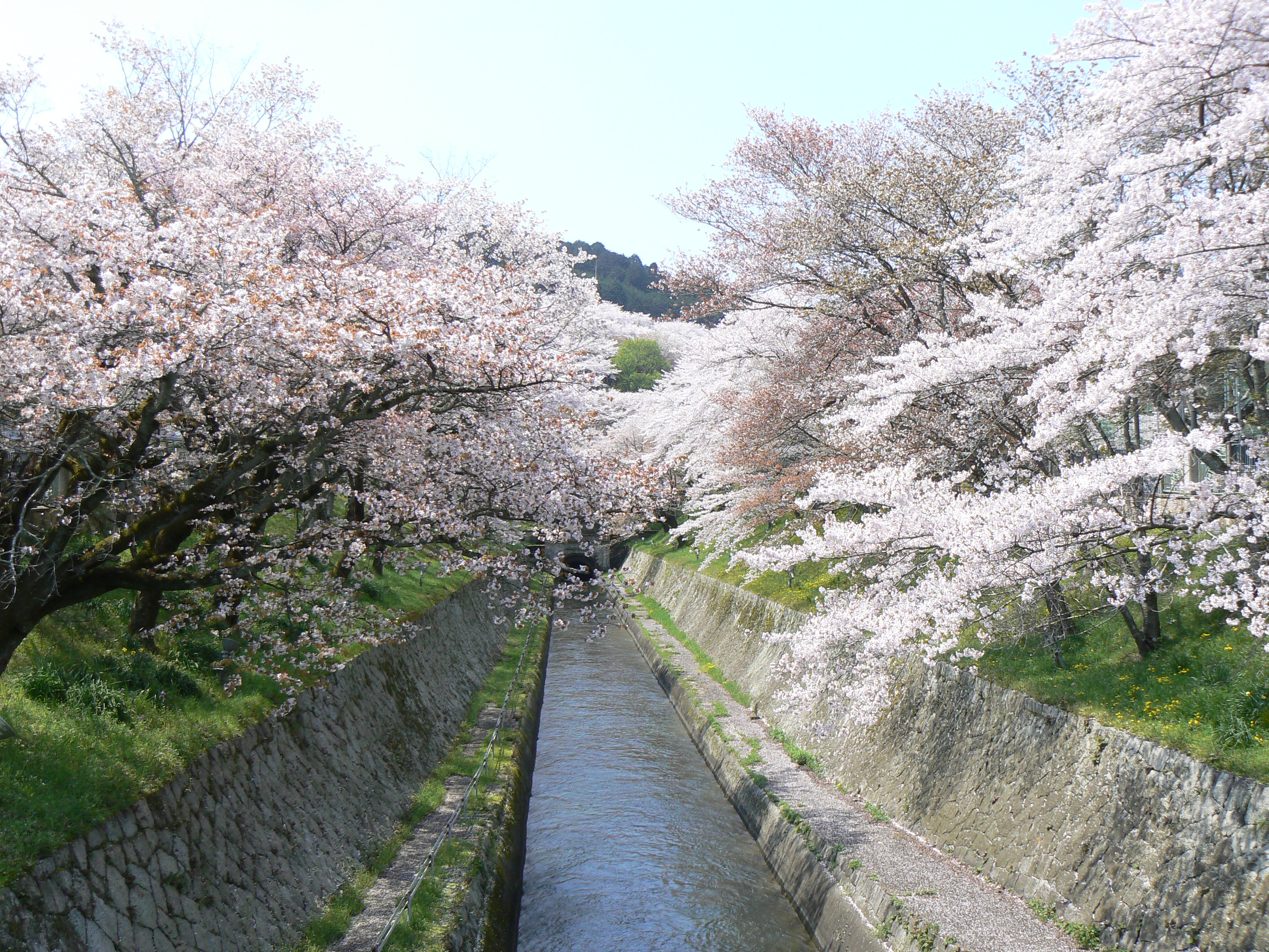 三井寺疎水